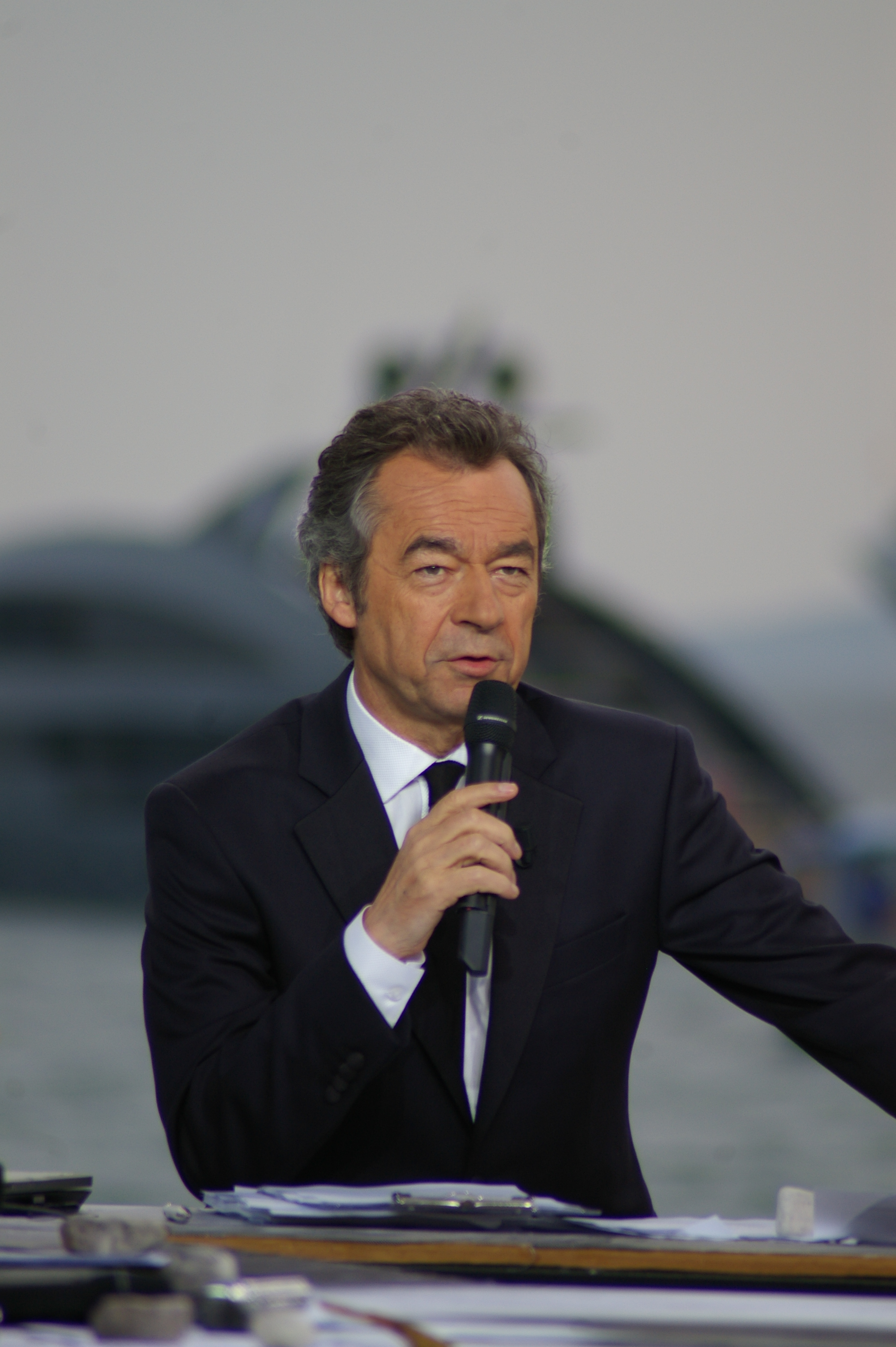 Michel Denisot animant Le Grand Journal sur Canal+ le 19 mai 2010 durant le festival de Cannes.